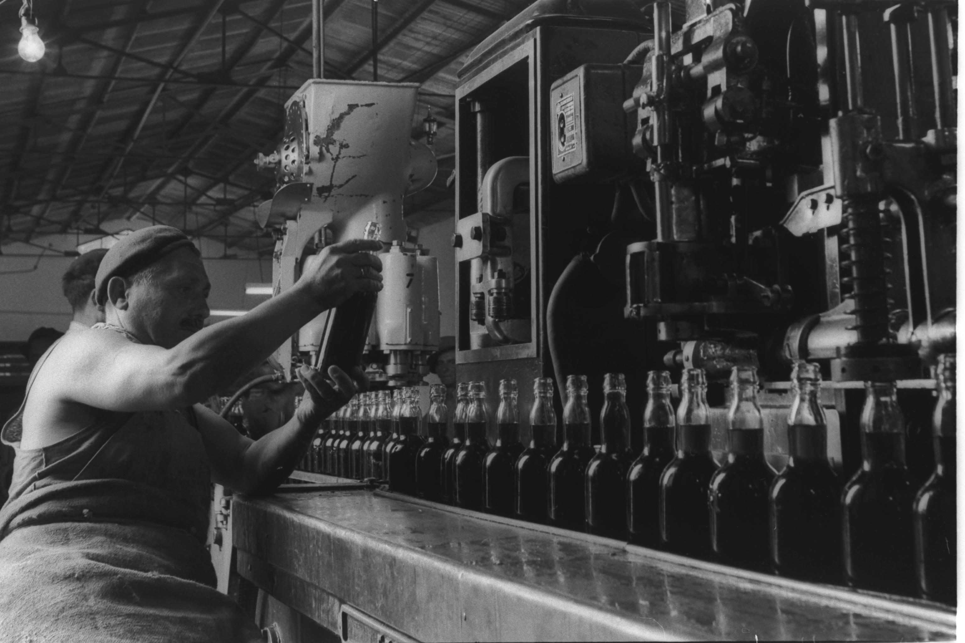 Bottling of wine at the Zichron Yaacov Wine Cellar. בקבוק יין במרתפי היין של זכרון יעקב Photo: BRAUNER TEDDY, 05/03/1952